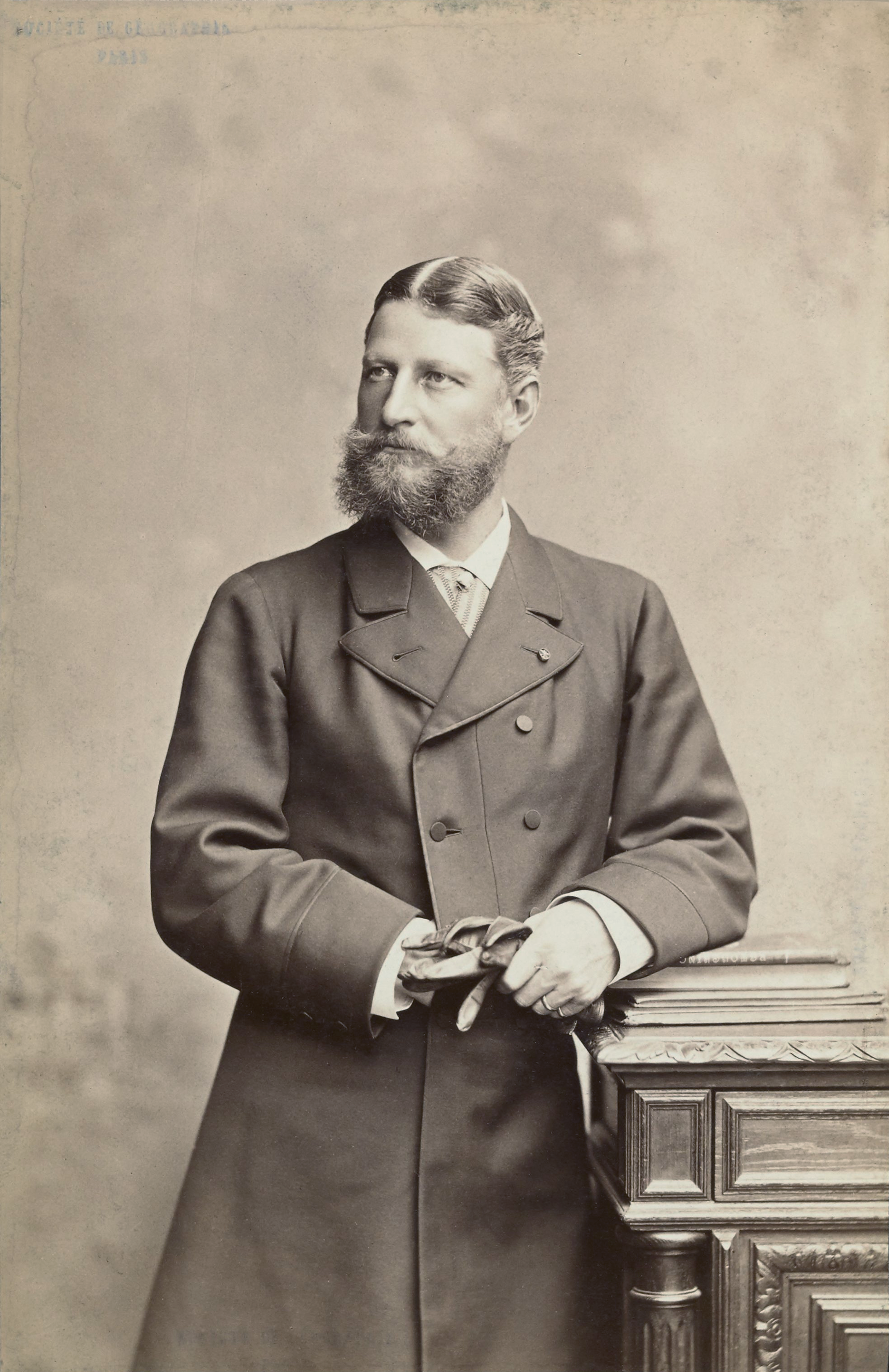 Louis Palander